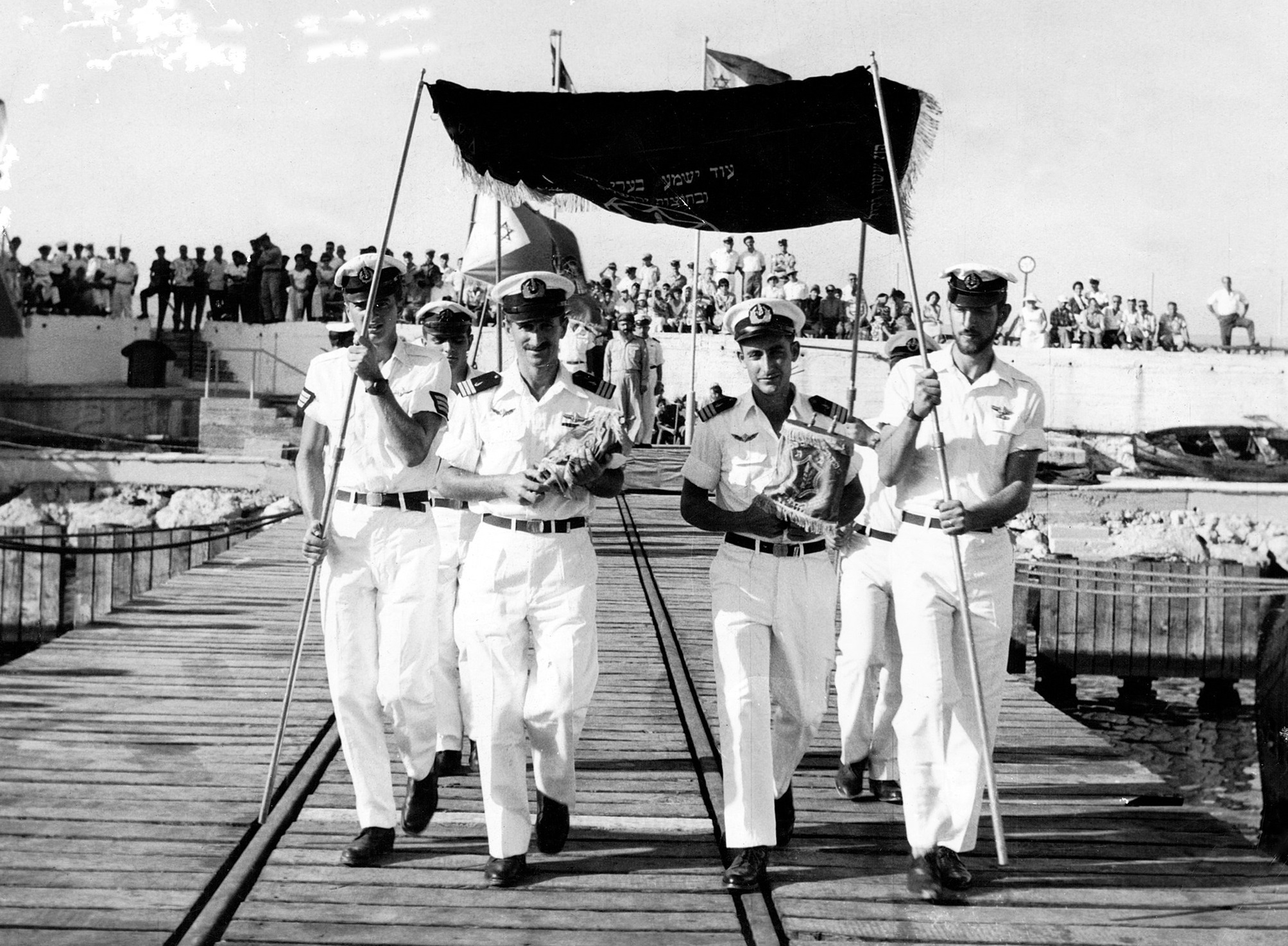 טקס הכנסת ספרי תורה שנכתבו במיוחד לשתי הצוללות הראשונות. נושאי הספרים: משמאל מפקד שייטת הצוללות ואח"י תנין סא"ל יוסף דרור ומיימין רס"ן הדר קמחי מפקד אח"י רהב.